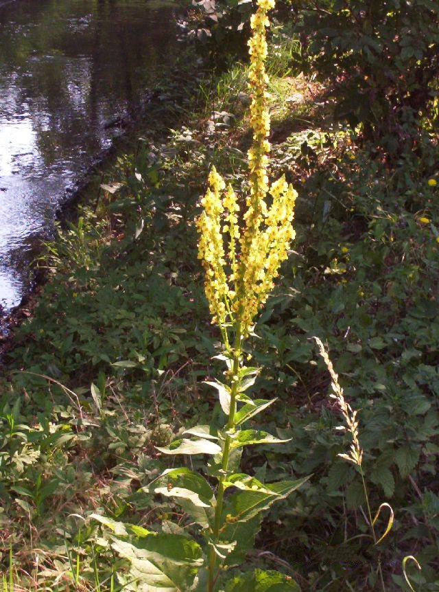 Molyhos ökörfarkkóró, saját kép